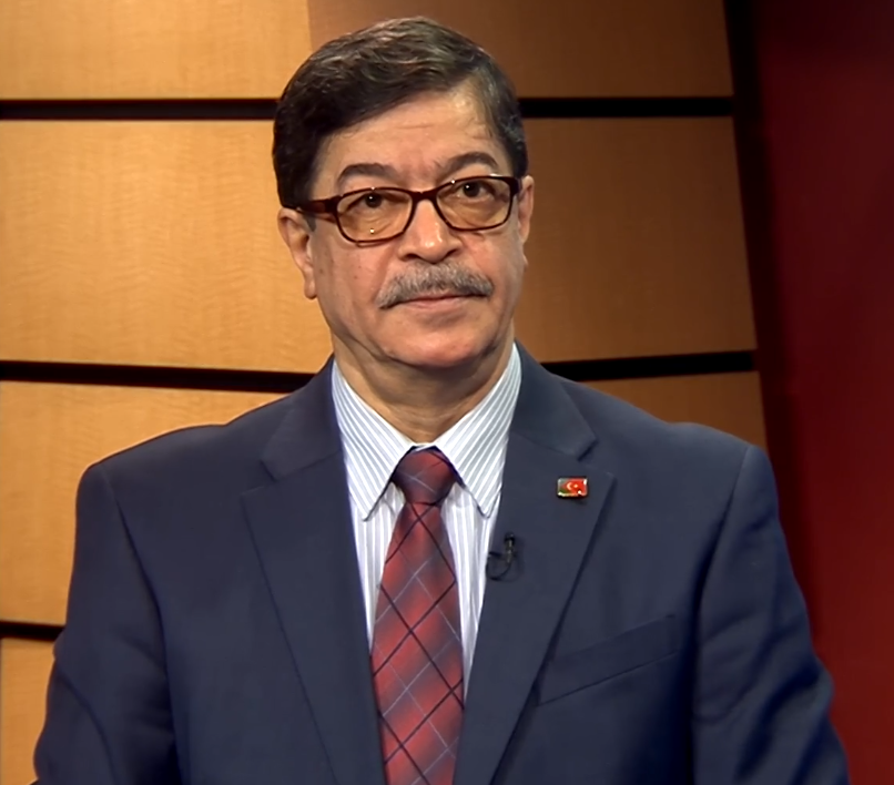 Mahmudəli Çöhrəqanlı 2017-ci ildə